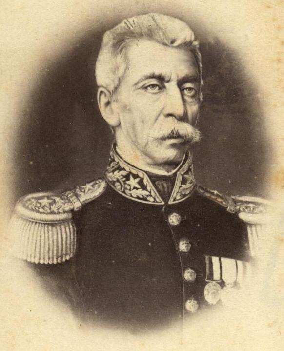 General José Santiago Aldunate